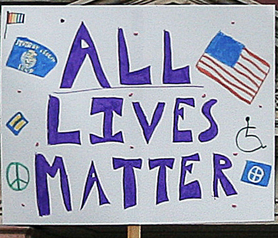 Nazis? Never!